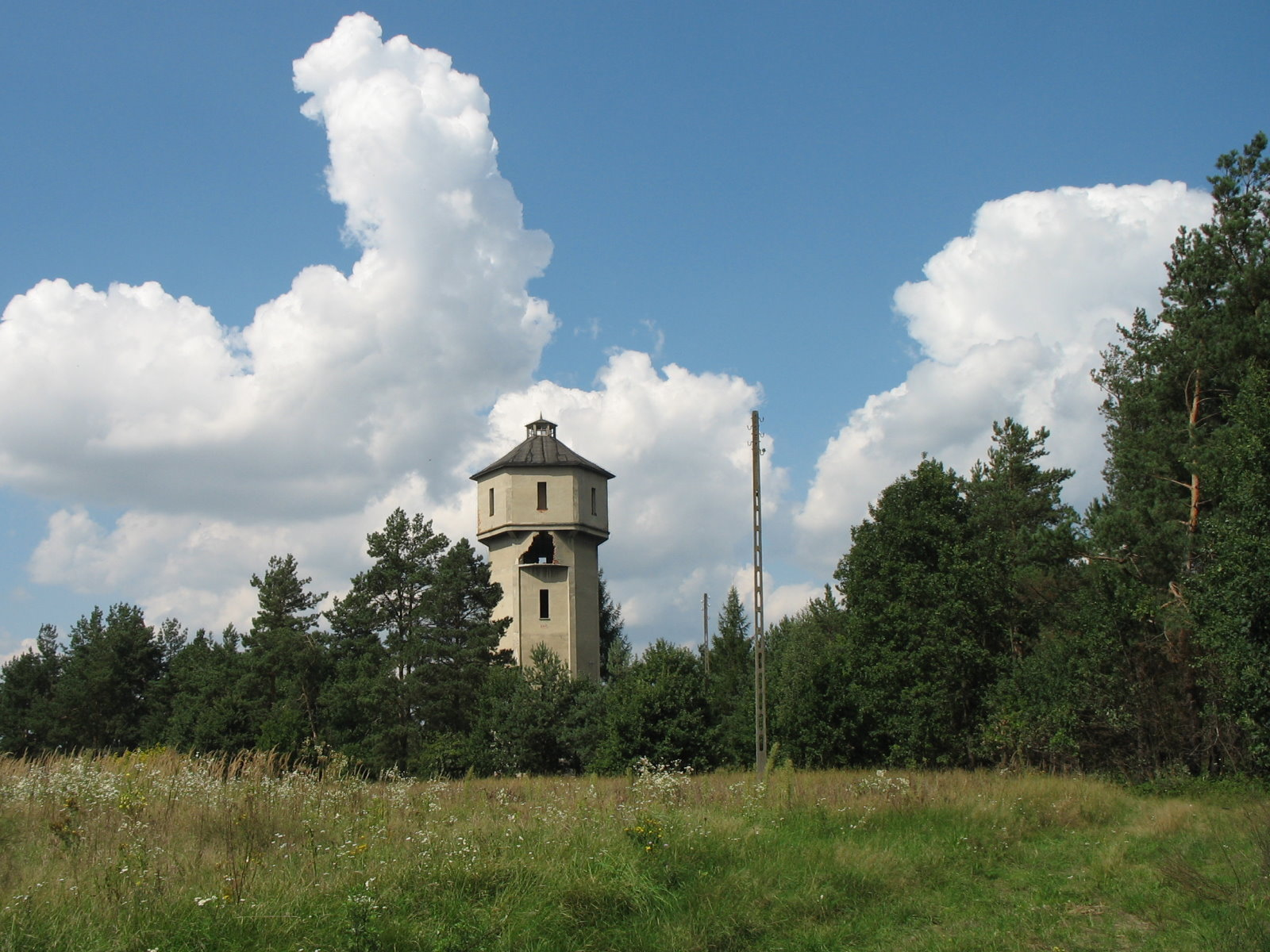 Basznia Dolna (Poland) railway station